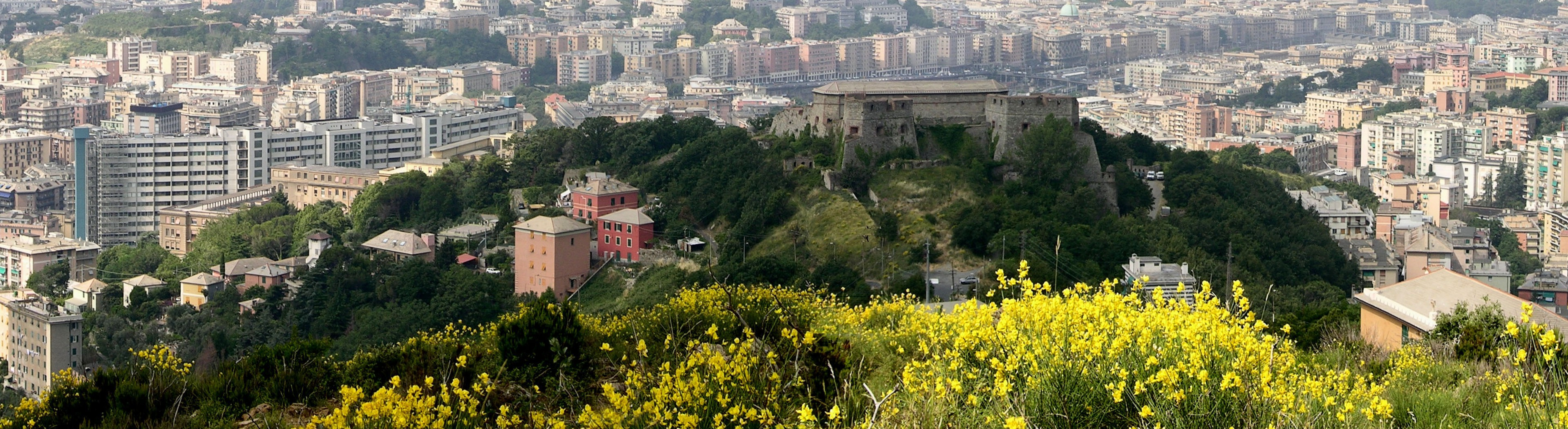 Particolare dell'image:Genova_-_Panorama_dai_Camaldoli.jpg (author Sidvics).